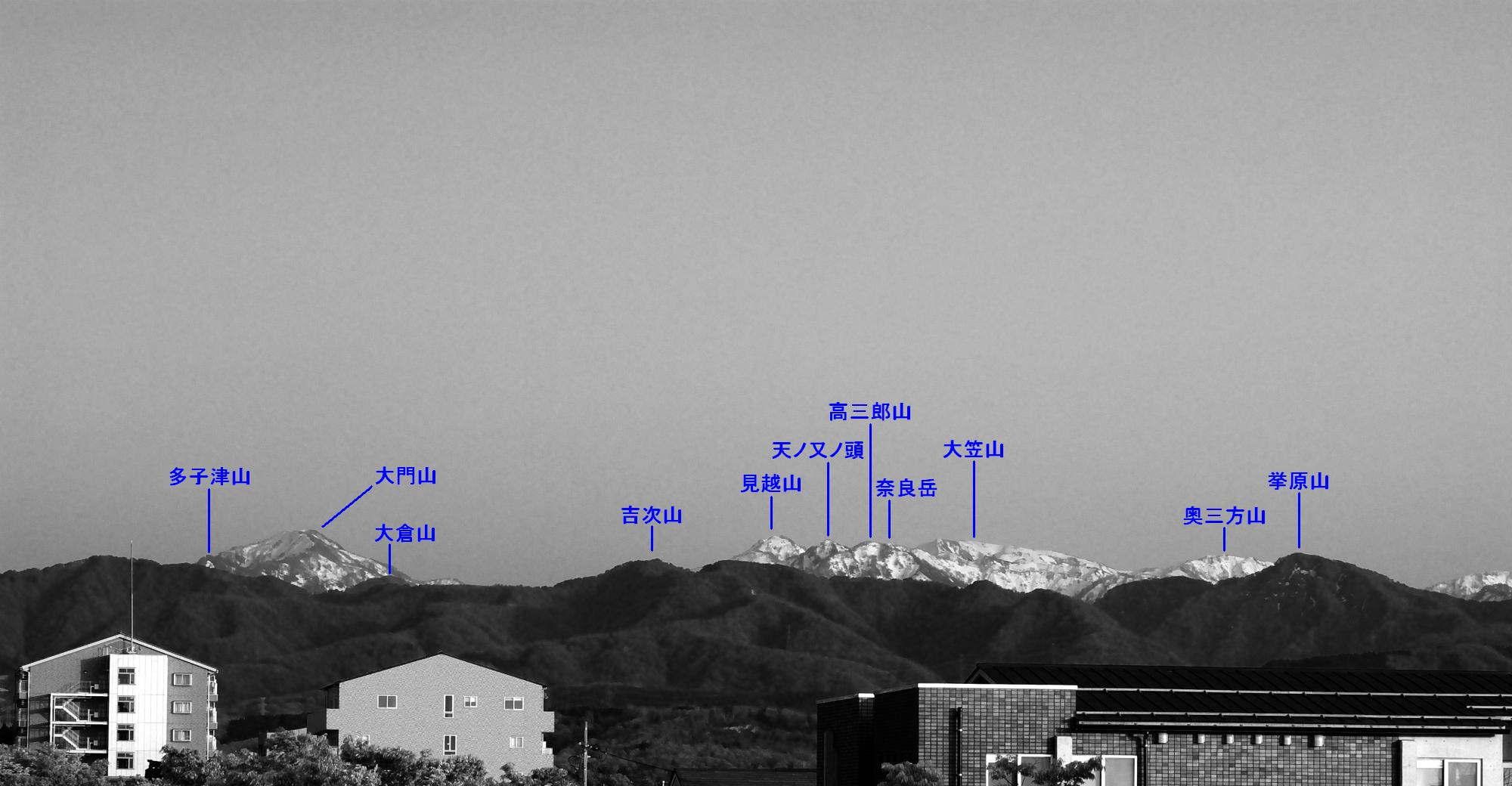 金沢の高峰群。金沢市浅野川流域より。赤外調に現像、解説入り。